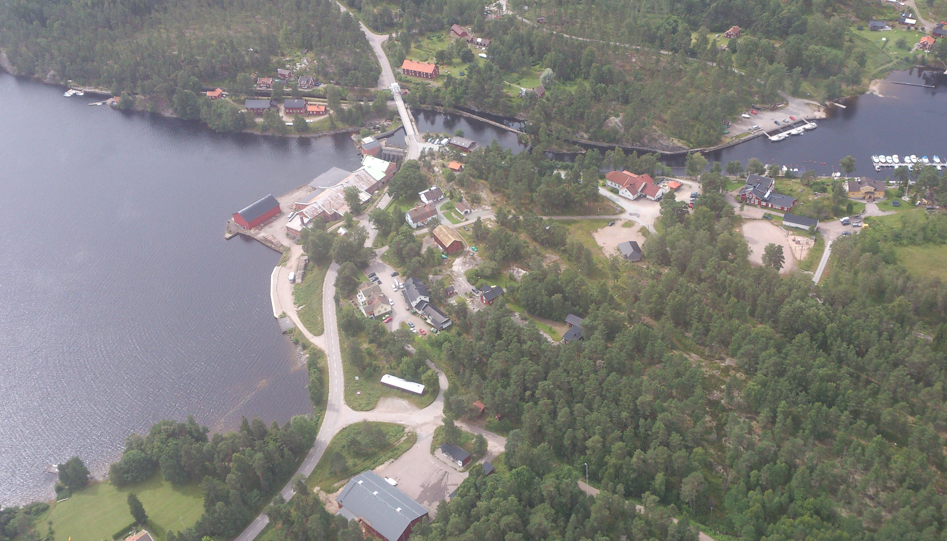 Lennartsfors, fotograferad från öster.